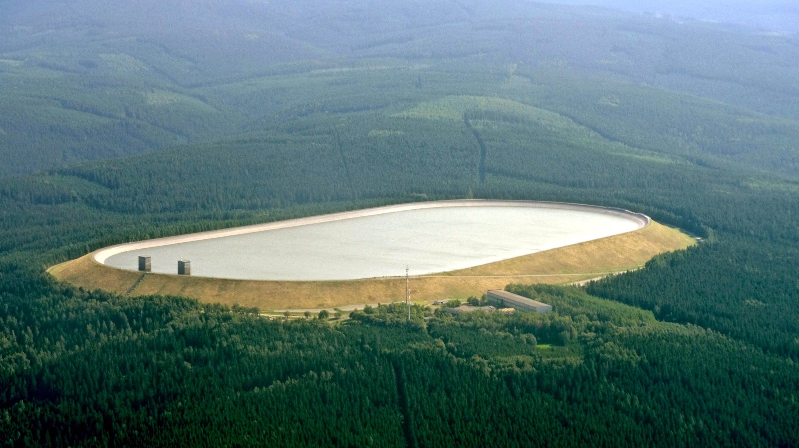 Pumpspeicherwerk Markersbach Oberbecken aus dem Flugzeug